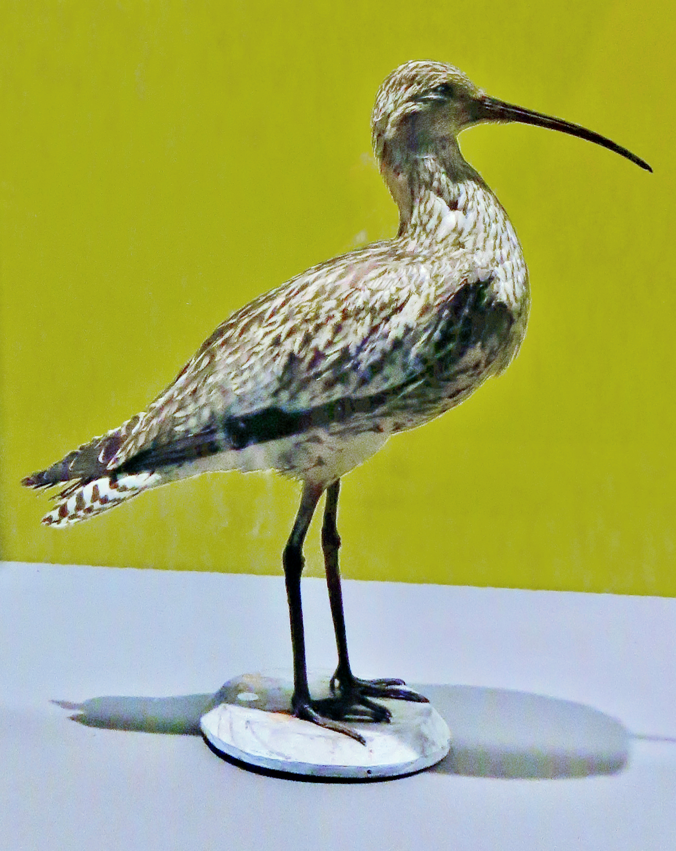 Chiurlottello - Took the picture at MUSE, Trento